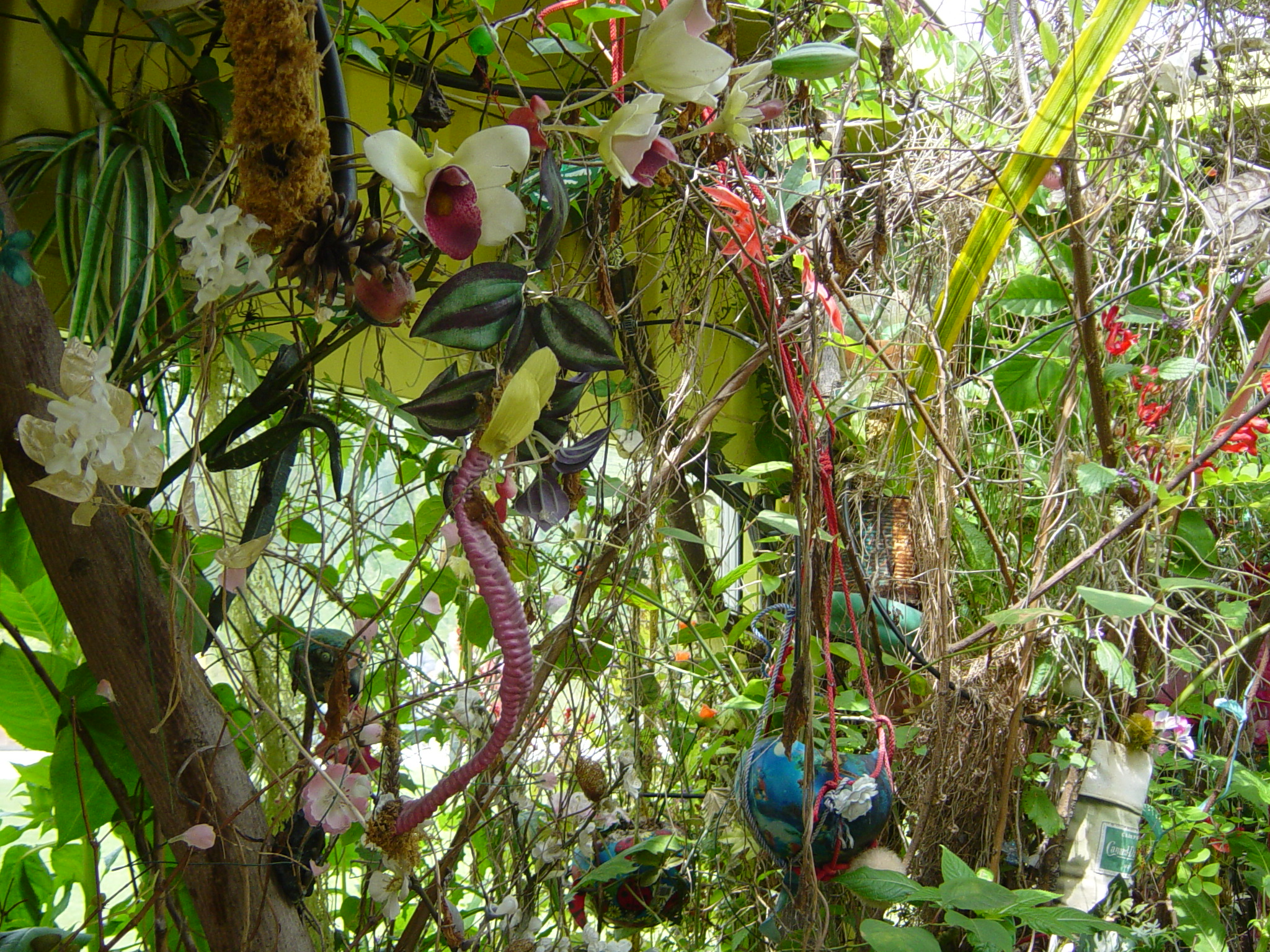 Installation von Gerda Steiner und Jörg Lenzlinger anlässlich der BUGA 2011 in Koblenz: Les envahisseurs! (Container gefüllt mit Pflanzen 2004; Leihgabe aus Genf)